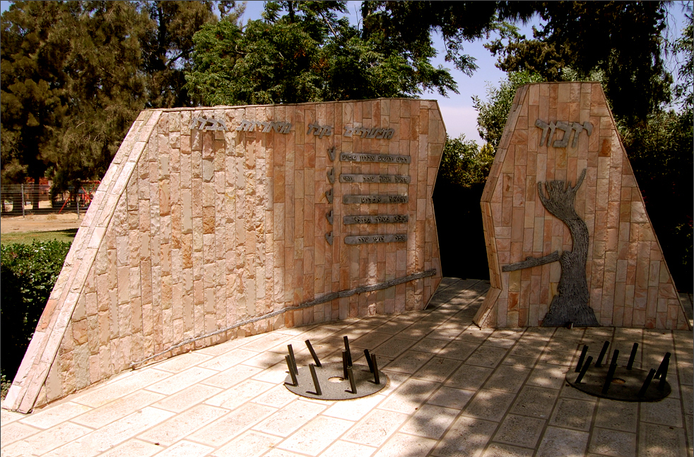 אנדרטת יד לבנים (לזכר הבנים הנופלים עיצוב אדריכל עמירם זיו במושב) ממוקמת בלב המושב